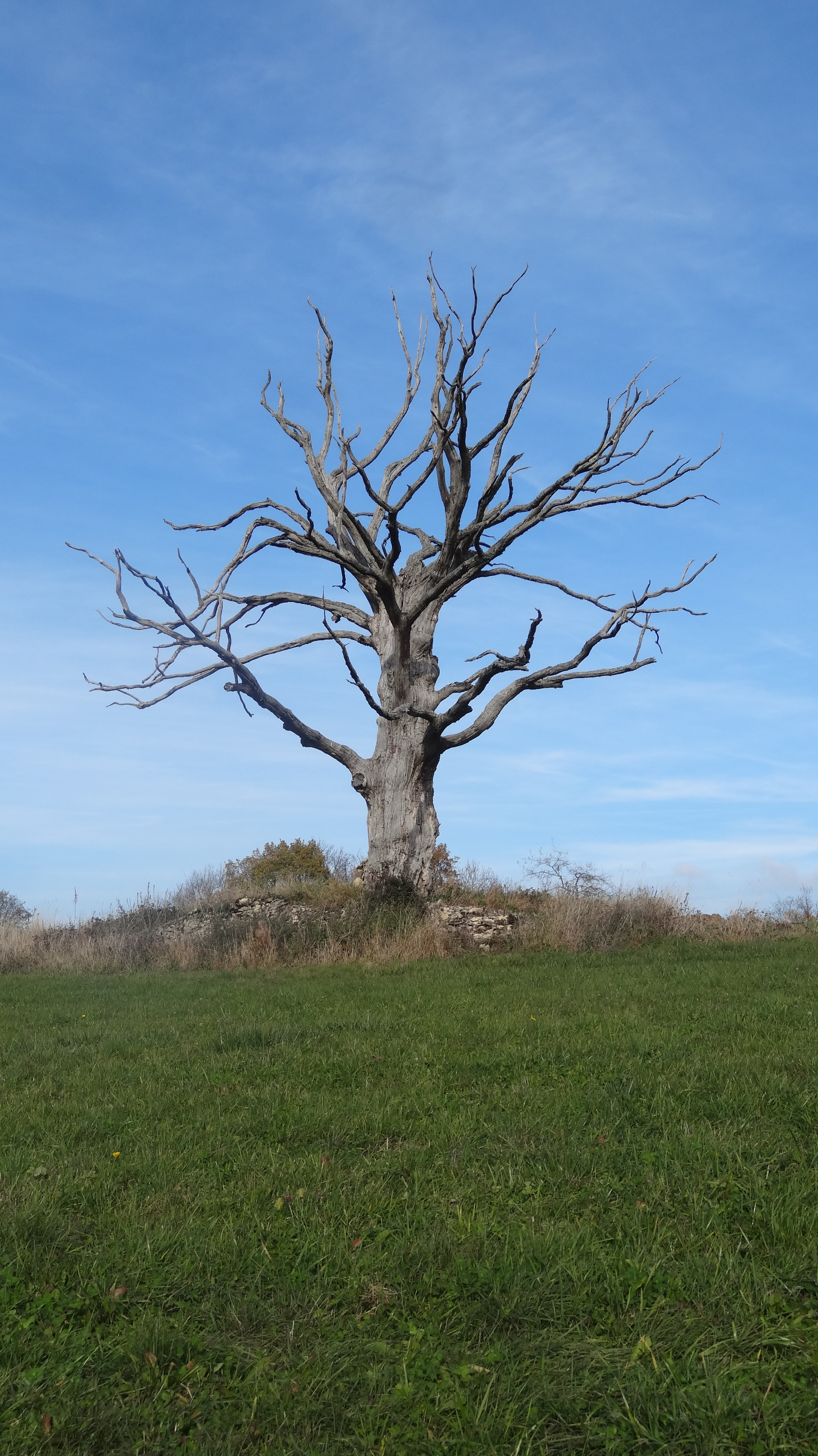 Un arbre mort sur le plateau de Suerme